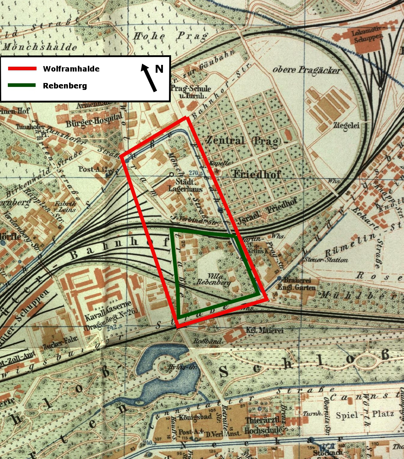 Plan der Stadt Stuttgart, Ausschnitt mit der Gegend um den südlichen Pragfriedhof, 1905.